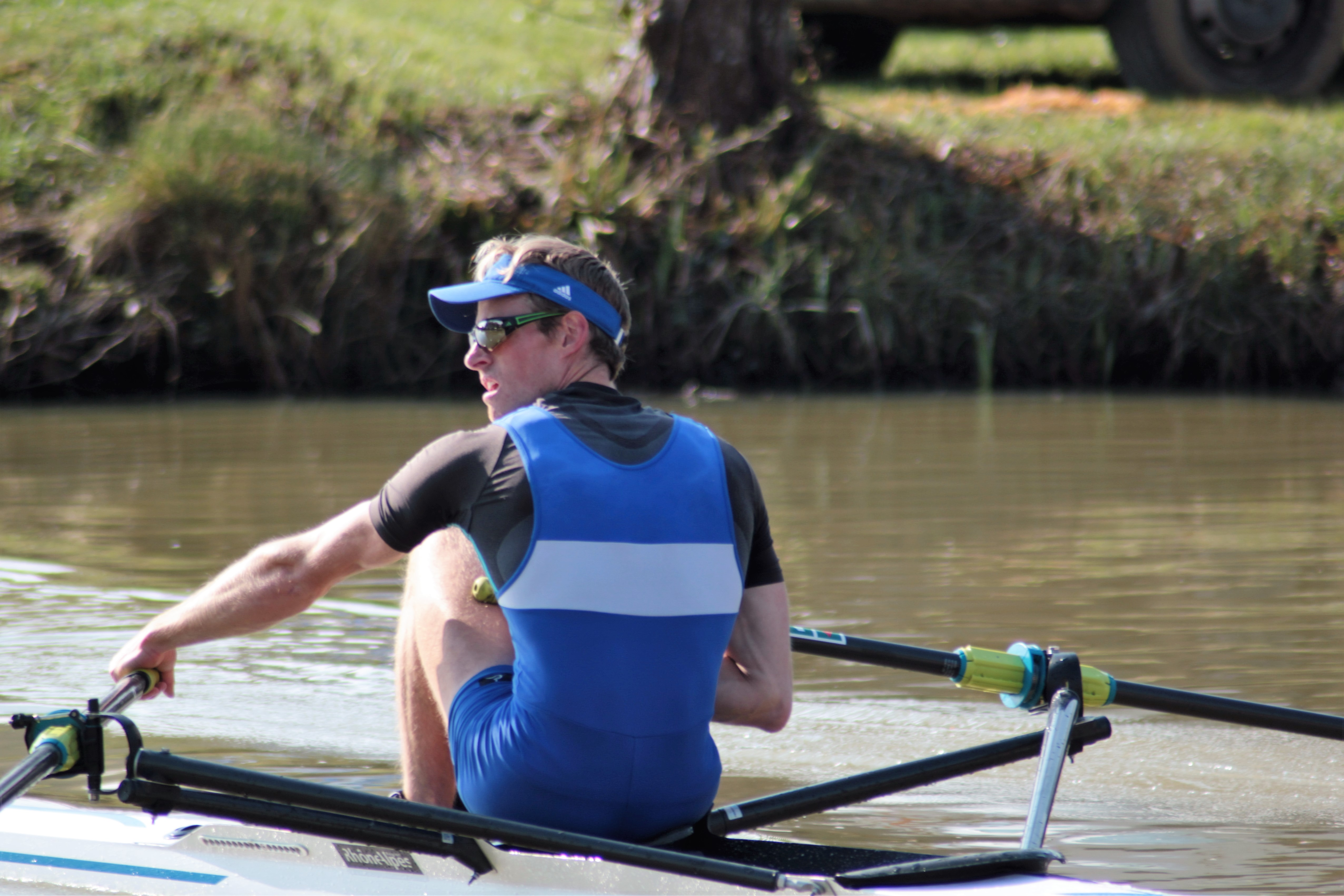 Jérémie Azou Championnat de France Cazaubon 2016